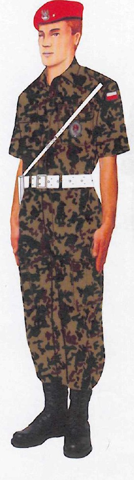 Mundur służbowy letni ŻW